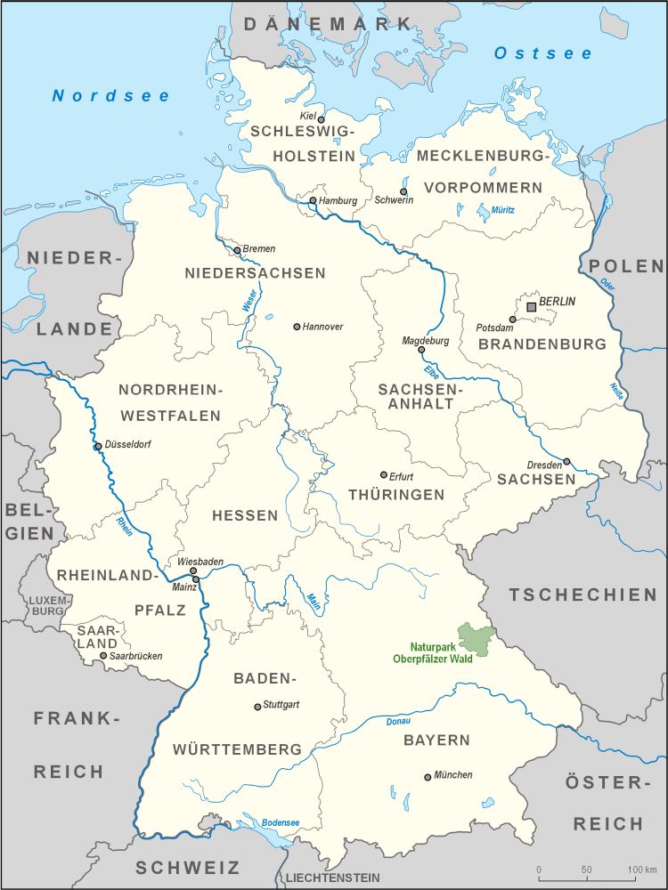 Karte des Naturparks Oberpfälzer Wald in Deutschland